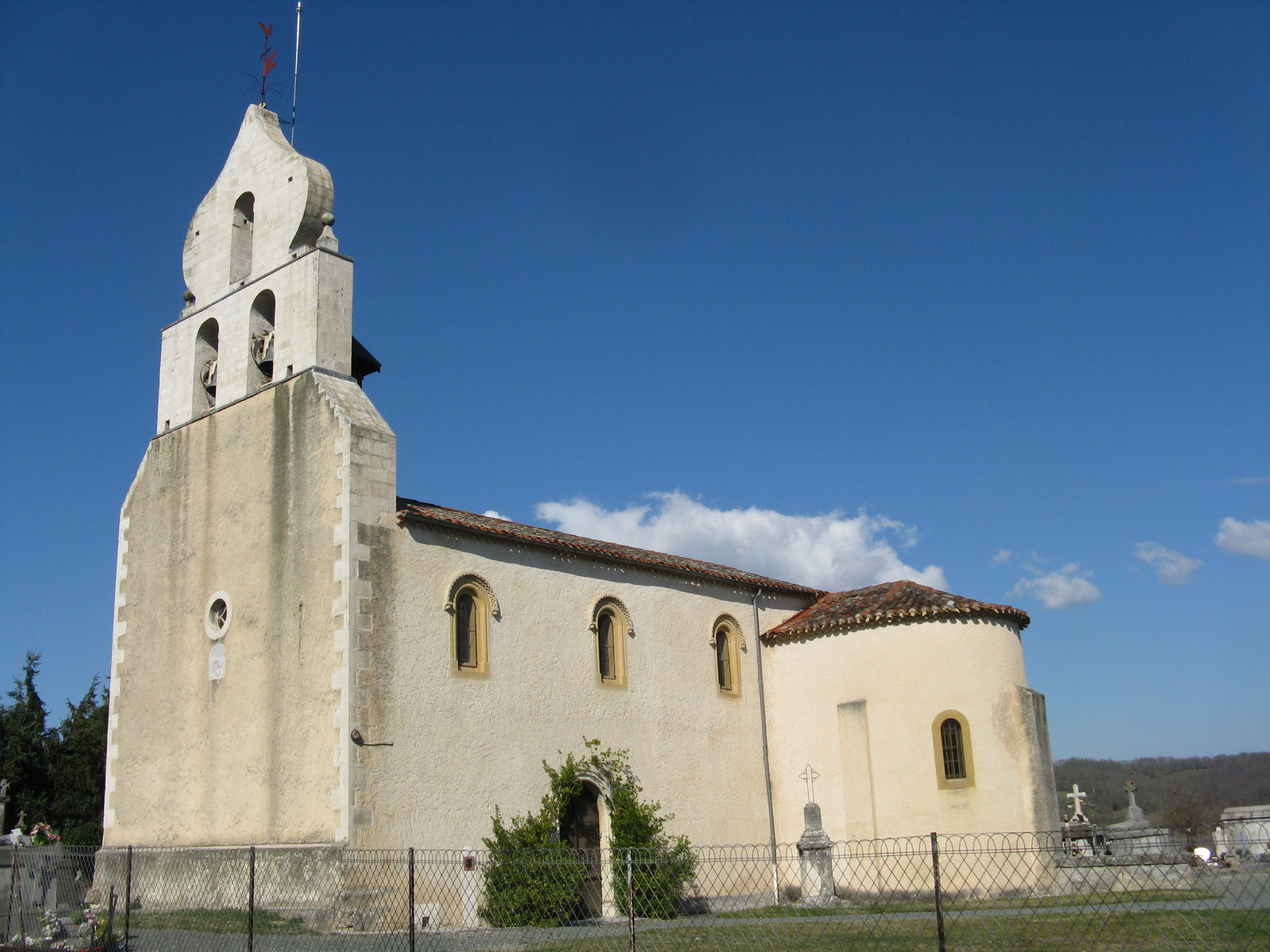 Vue extérieure de l'église de His (Haute-Garonne, France).